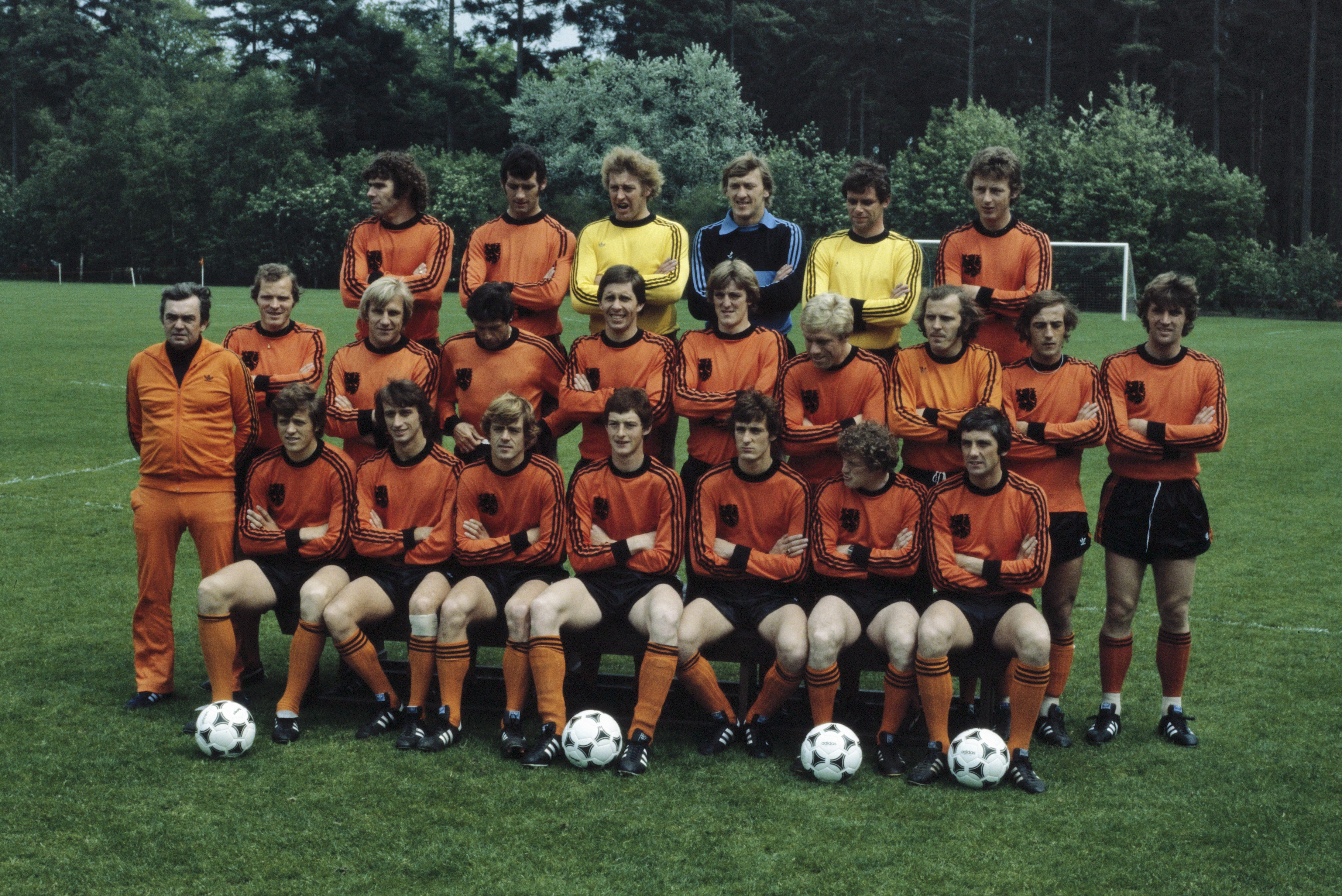 Collectie / Archief : Fotocollectie Anefo Reportage / Serie : [ onbekend ] Beschrijving : Selectie voor de Wereldkampioenschappen voetbal in Argentinië. Datum : mei 1978 Locatie : Argentinië Trefwoorden : elftallen, sport, voetbal Fotograaf : Peters, Hans / Anefo Auteursrechthebbende : Nationaal Archief Materiaalsoort : Dia (kleur) Nummer archiefinventaris : bekijk toegang 2.24.01.06 Bestanddeelnummer : 253-8014